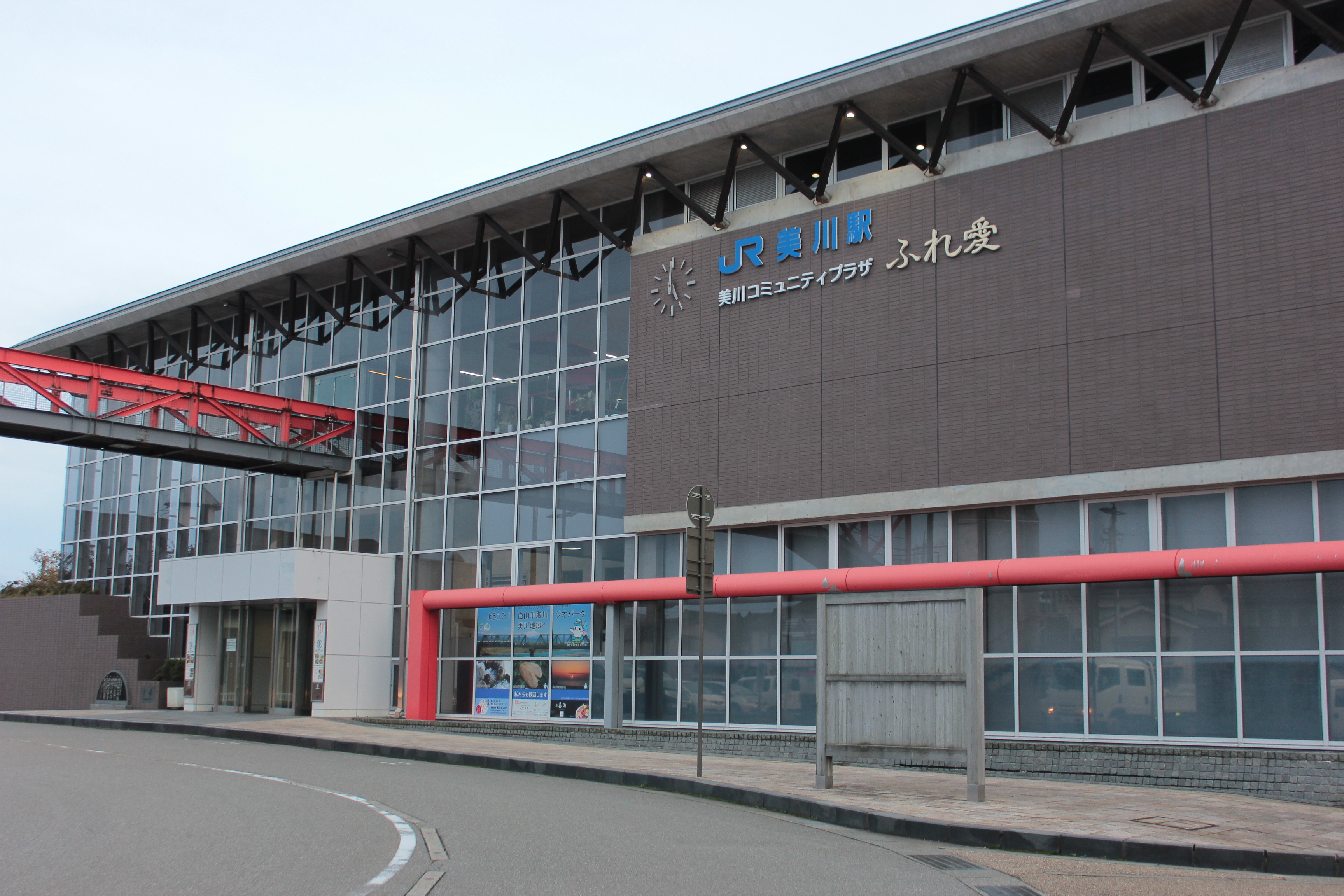 美川駅（石川県白山市） Canon EOS Kiss X5